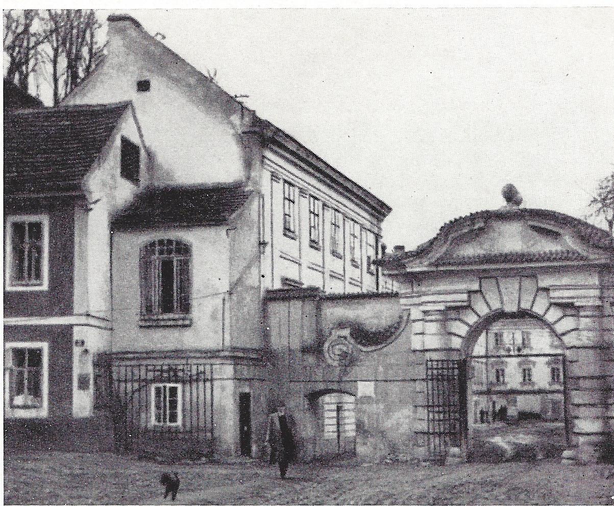 Gasthaus zur Kaisermühle in Prag. BeliebtesMensurlokal der Prager Studenten bis in die 1930er Jahre.